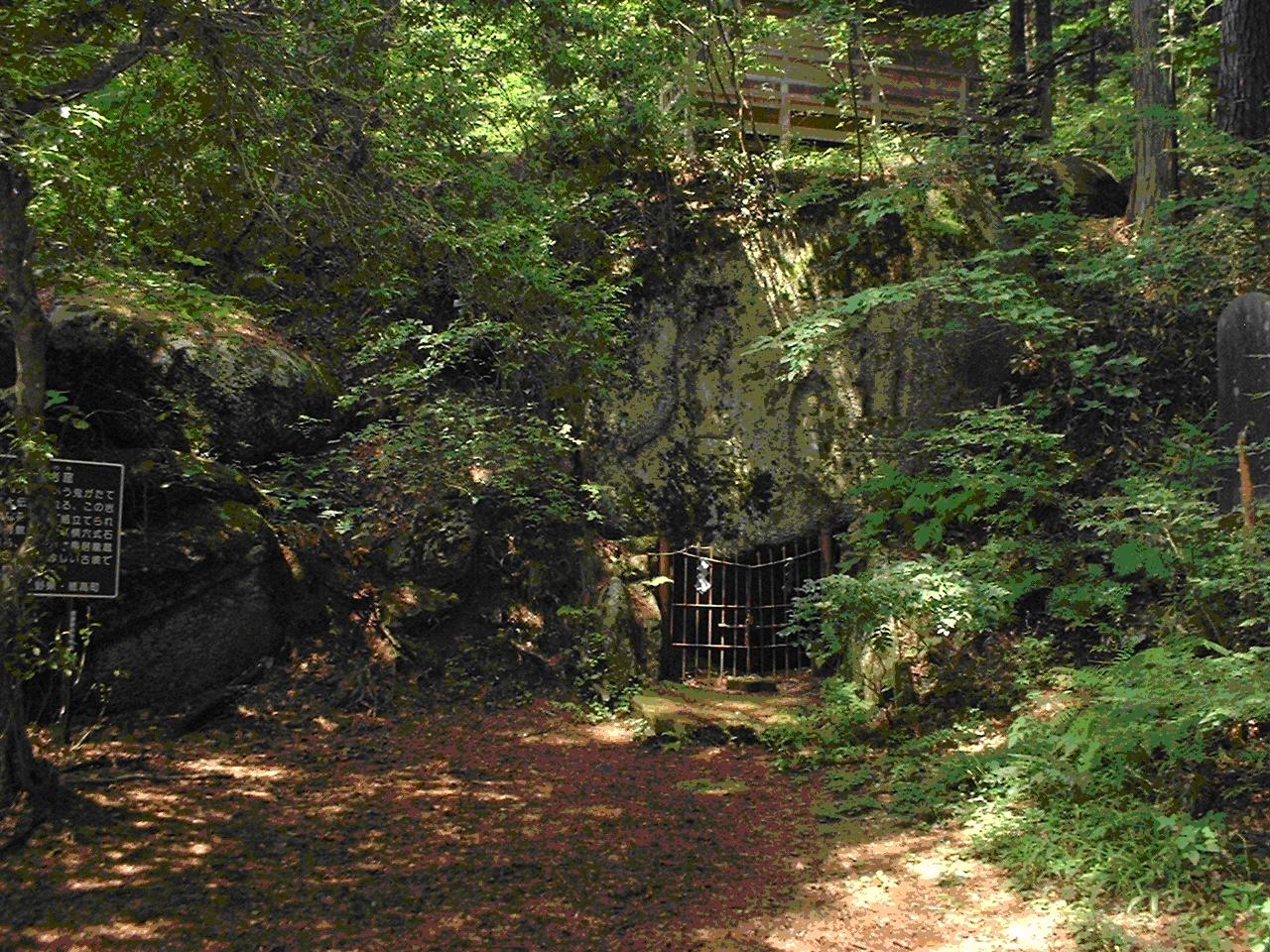 長野県安曇野市穂高有明にある魏石鬼窟。